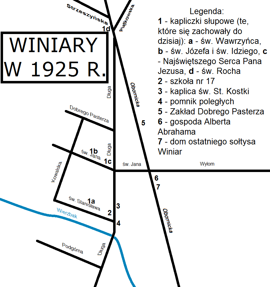 Schematyczny plan Winiar, w momencie przyłączenia ich do Poznania, na podstawie: Niedługo po 1925 r. nazwy niektórych ulic zmieniły nazwy: Podgórna na Bonin (1926), Długa na Winiarską i św. Jana na św. Leonarda (1927). Ul. Dobrego Pasterza zmieniła nazwę na Adama Wrzoska dopiero w 1977 r., a ten odcinek Obornickiej na Piątkowską w latach 90. XX wieku